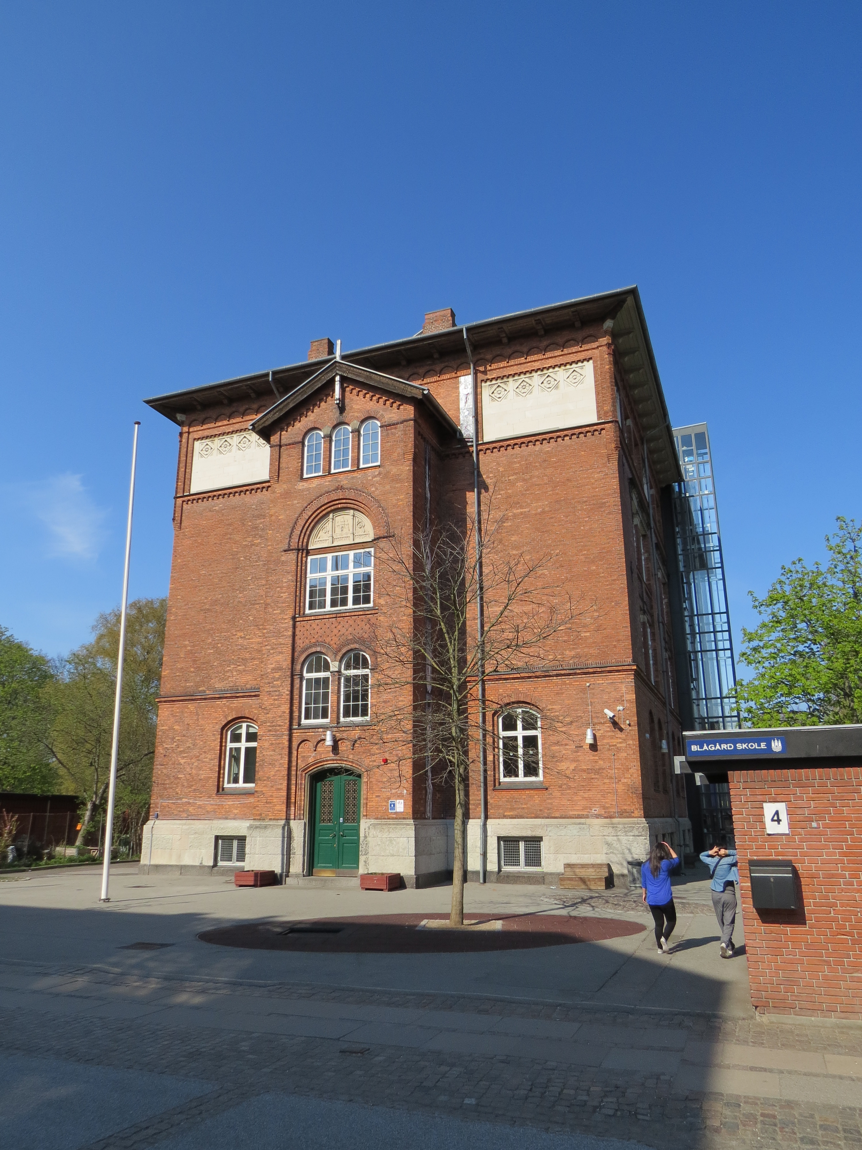 Blågård skole, København